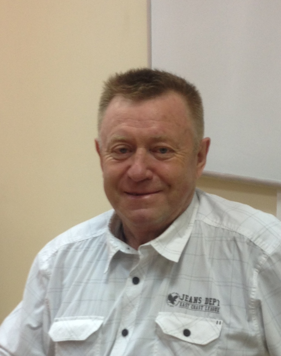 Василий Николаевич Денисов (род. 1951) — математик, доктор физико-математических наук, профессор кафедры общей математики факультета ВМК МГУ.